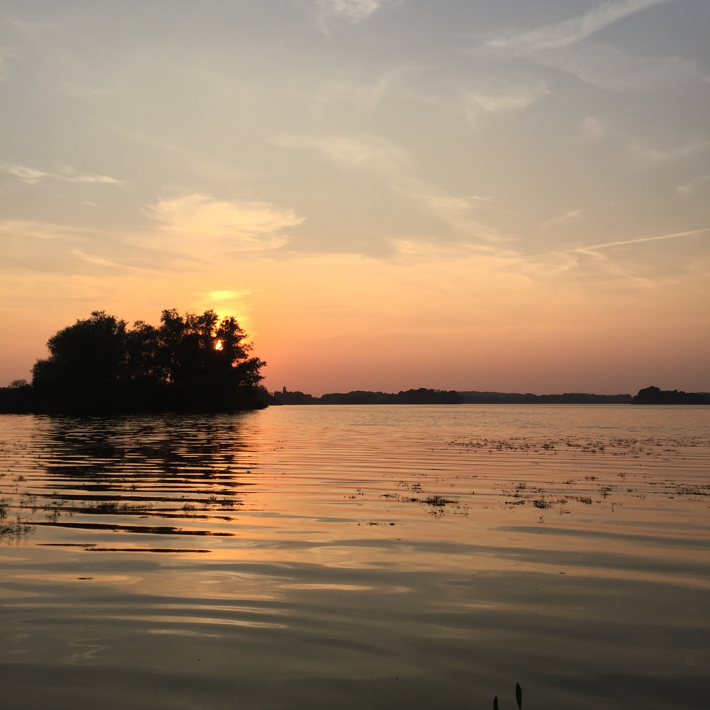 Sonnenuntergang am Kleinen Plöner See